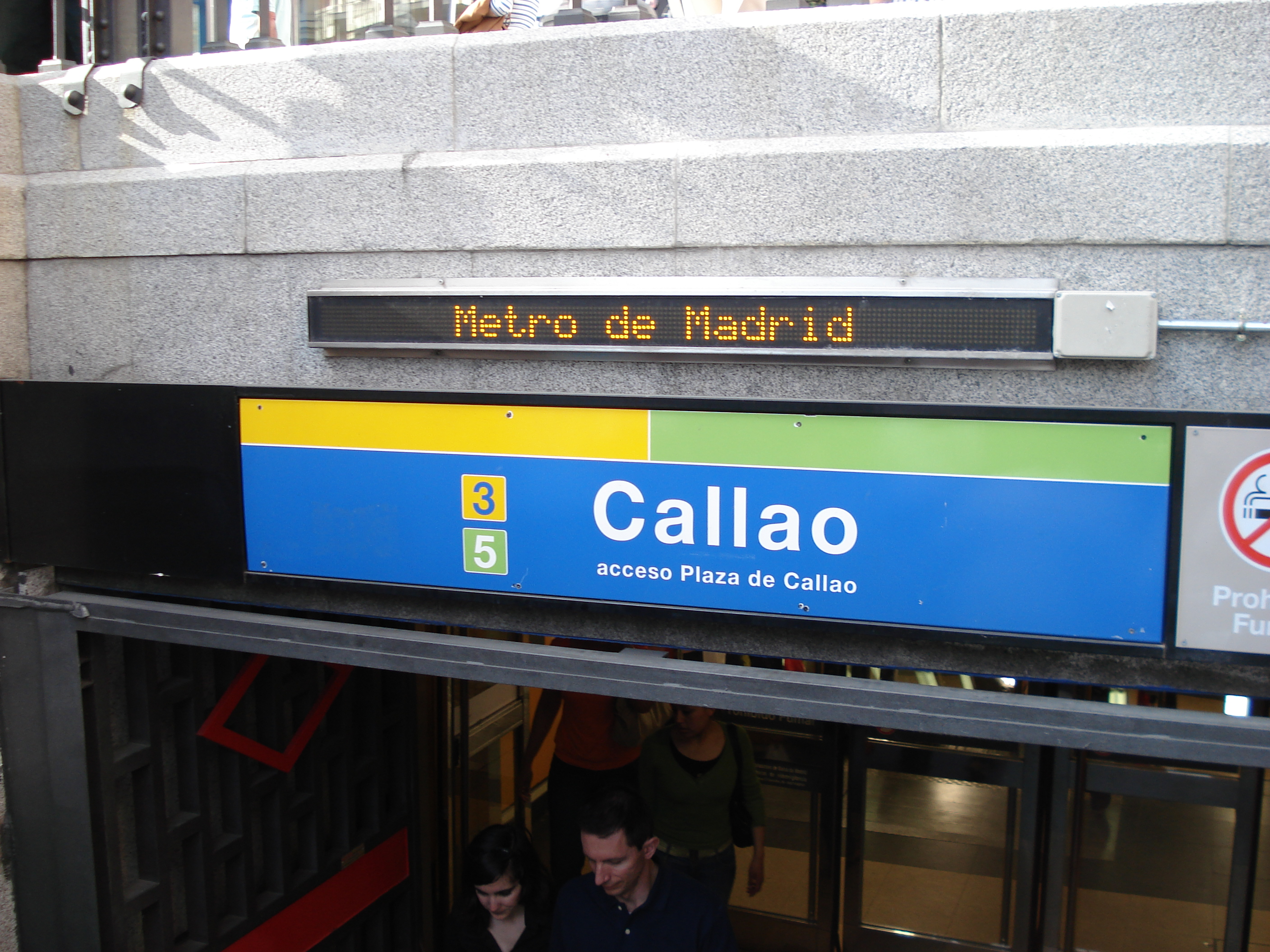 Imagen de la estacion de Callao de Madrid